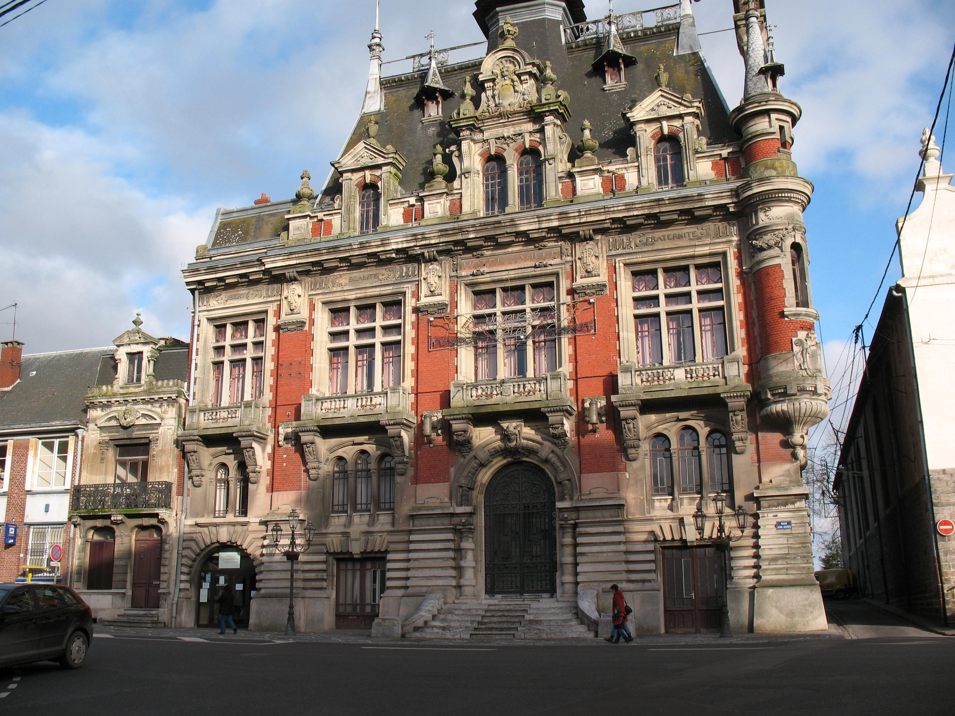 Hôtel de ville de Solesmes Nord : construction traitée par l'architecte Laurent Fortier à la manière flamande.